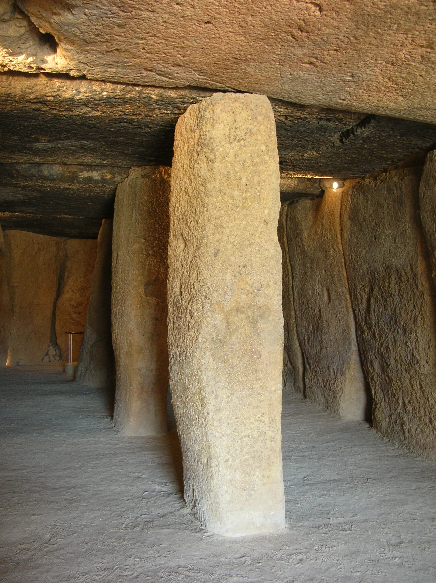 L'intérieur du dolmen de Menga (Antequera, Andalousie, Espagne)